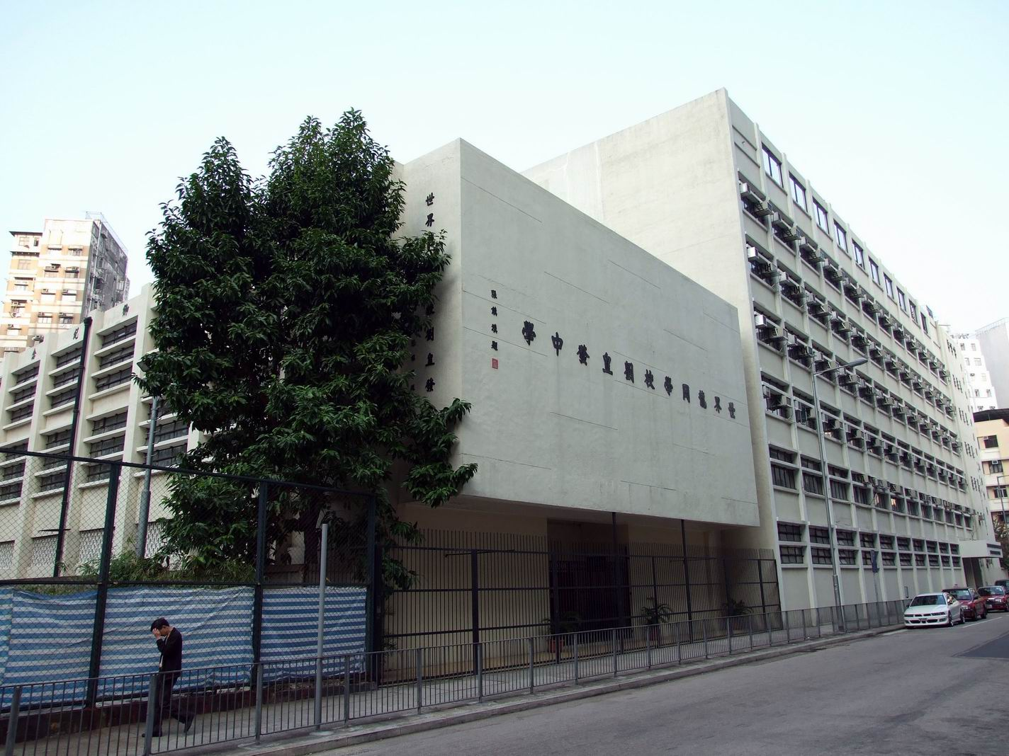 世界龍岡學校劉皇發中學